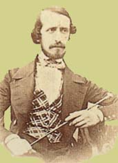 Fratello di Giacomo Leopardi